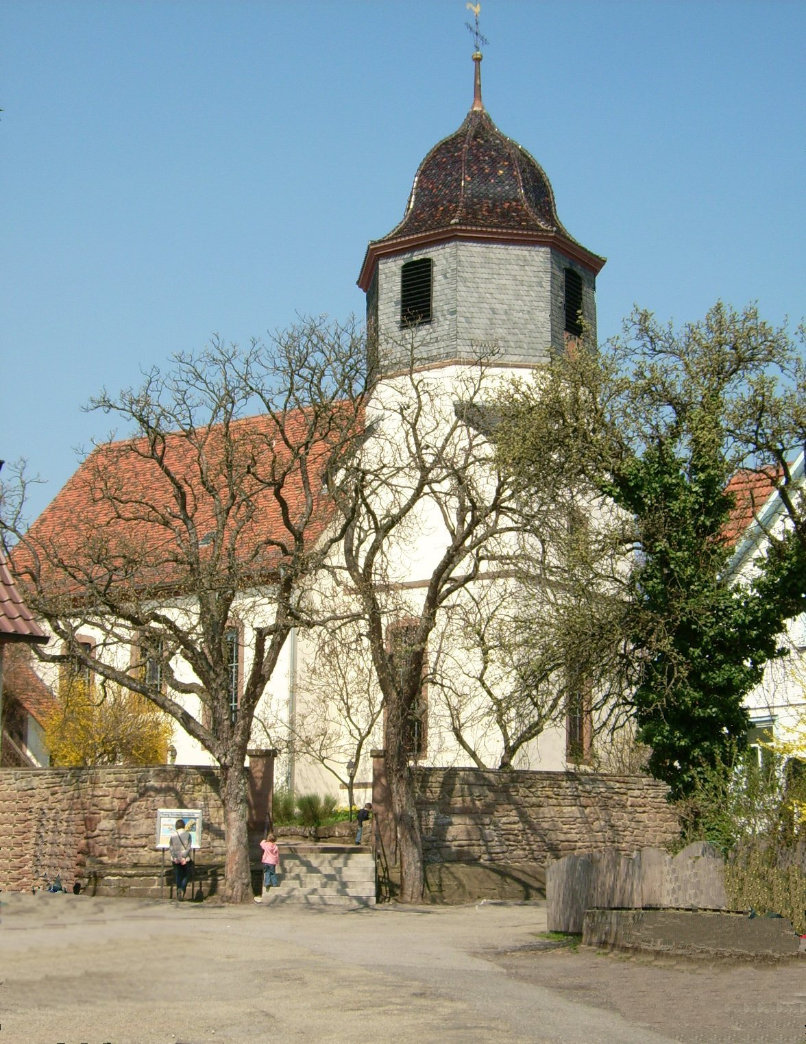 Kirche Church Zaisersweiher Germany